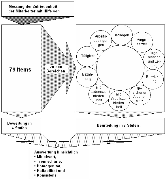 Vorgehen beim ABB nach Hacker